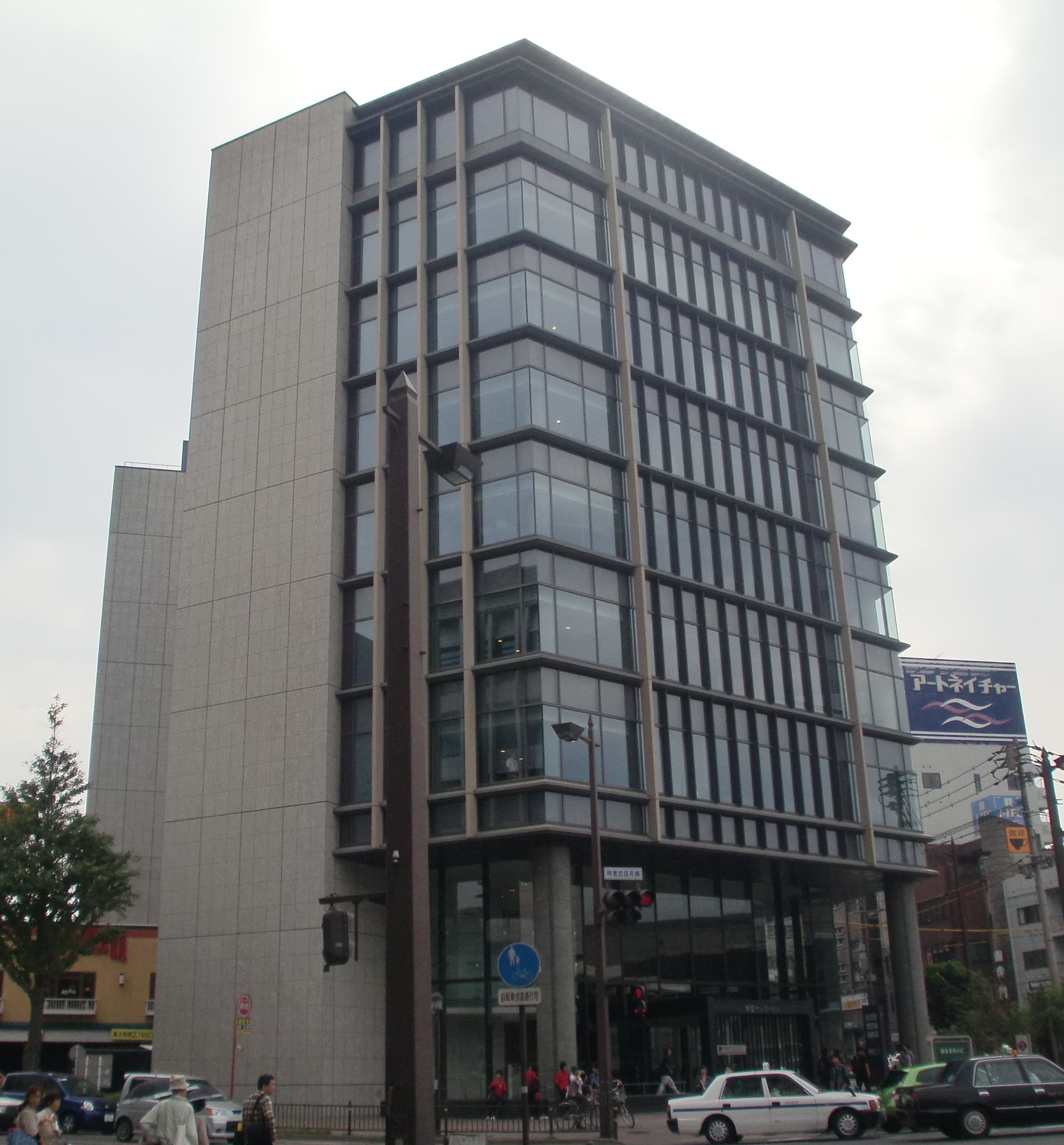 南国殖産の本社ビル。